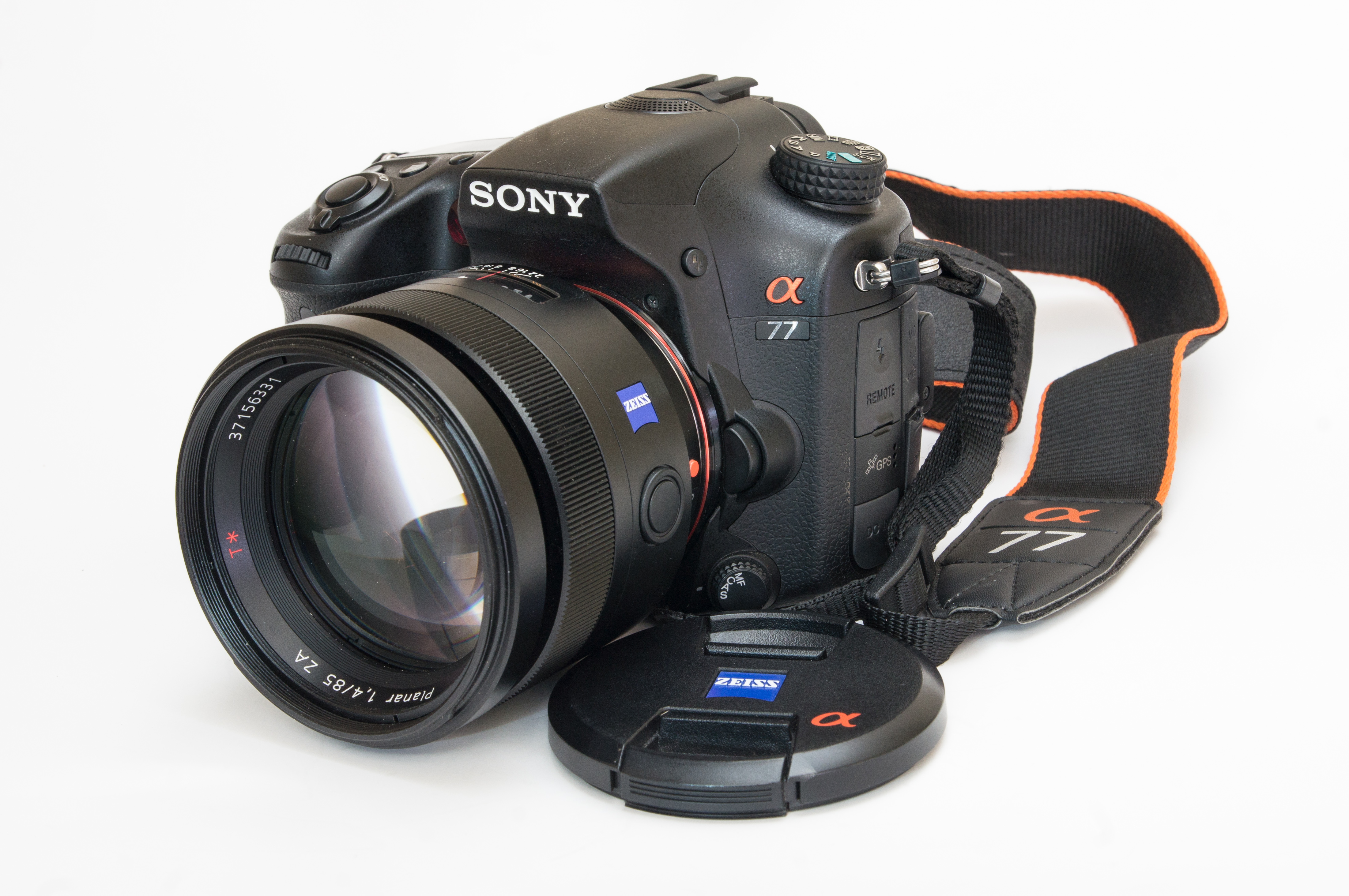 Aparat Sony A77 (SLT-77) z obiektywem Carl Zeiss Planar T* 85/1.4.